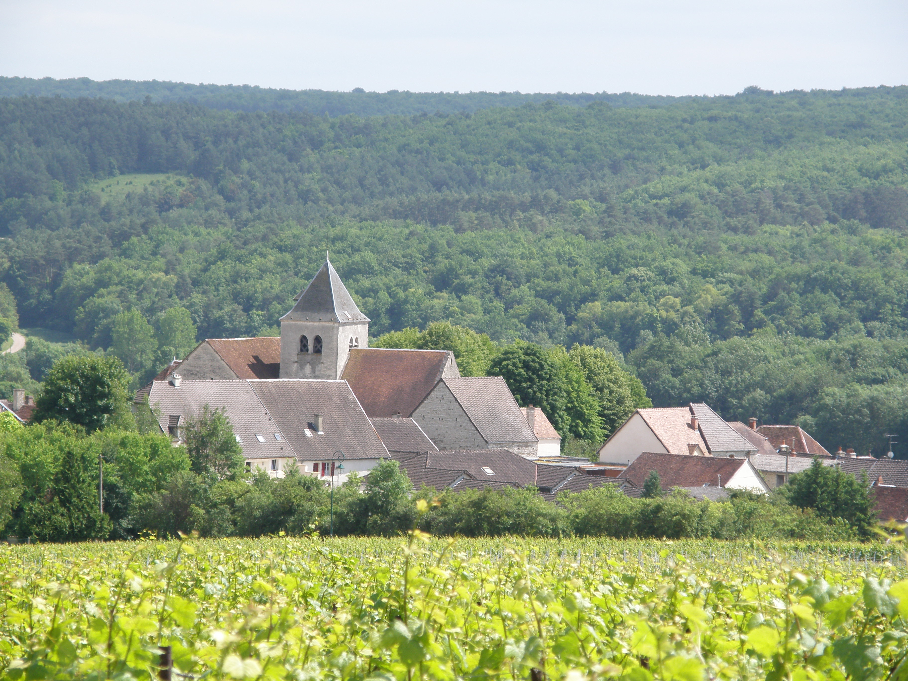 10110 Landreville